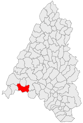 Categorie:Hărţi ale judeţului Bihor